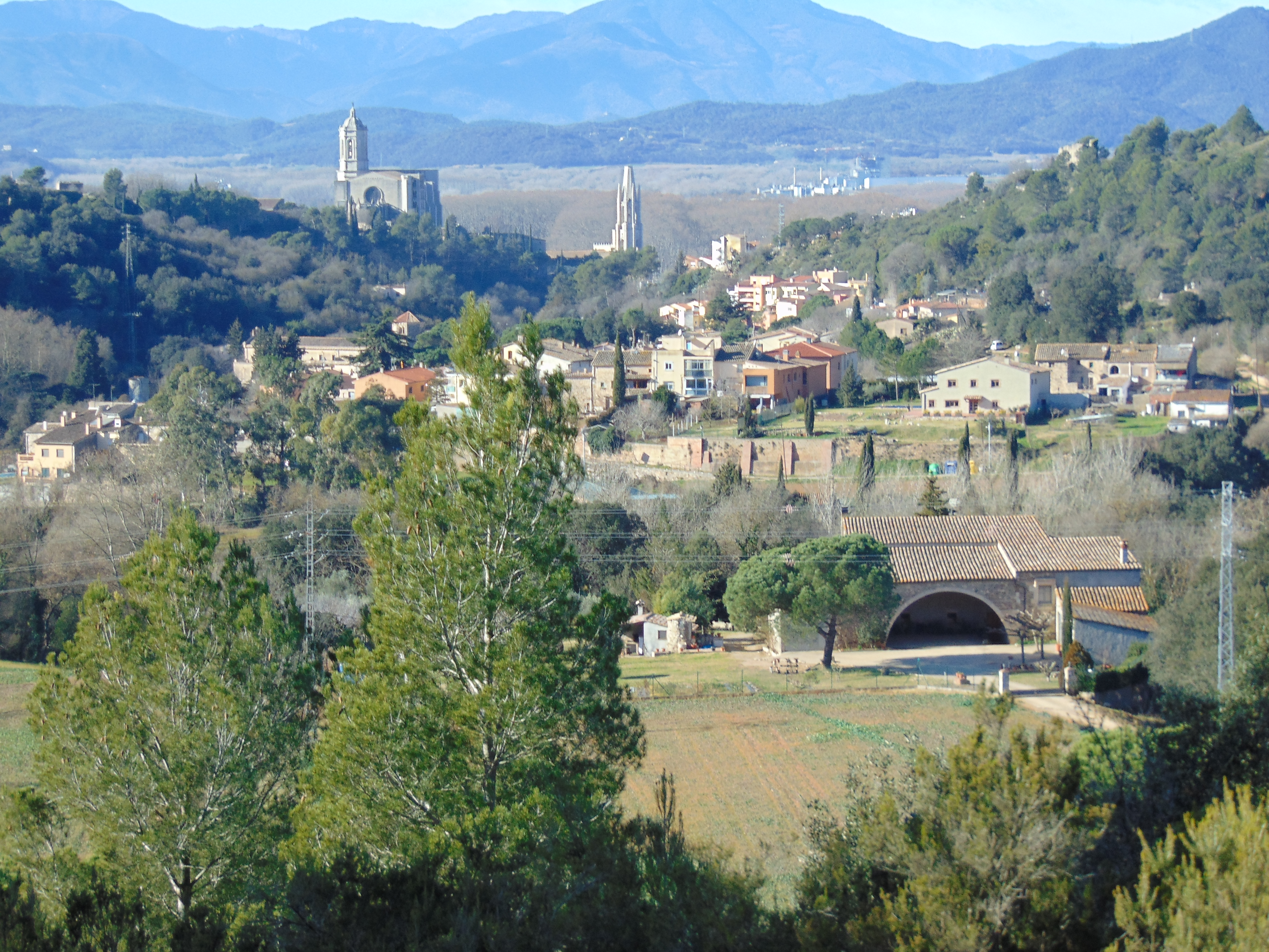 Manso Pi (Girona)